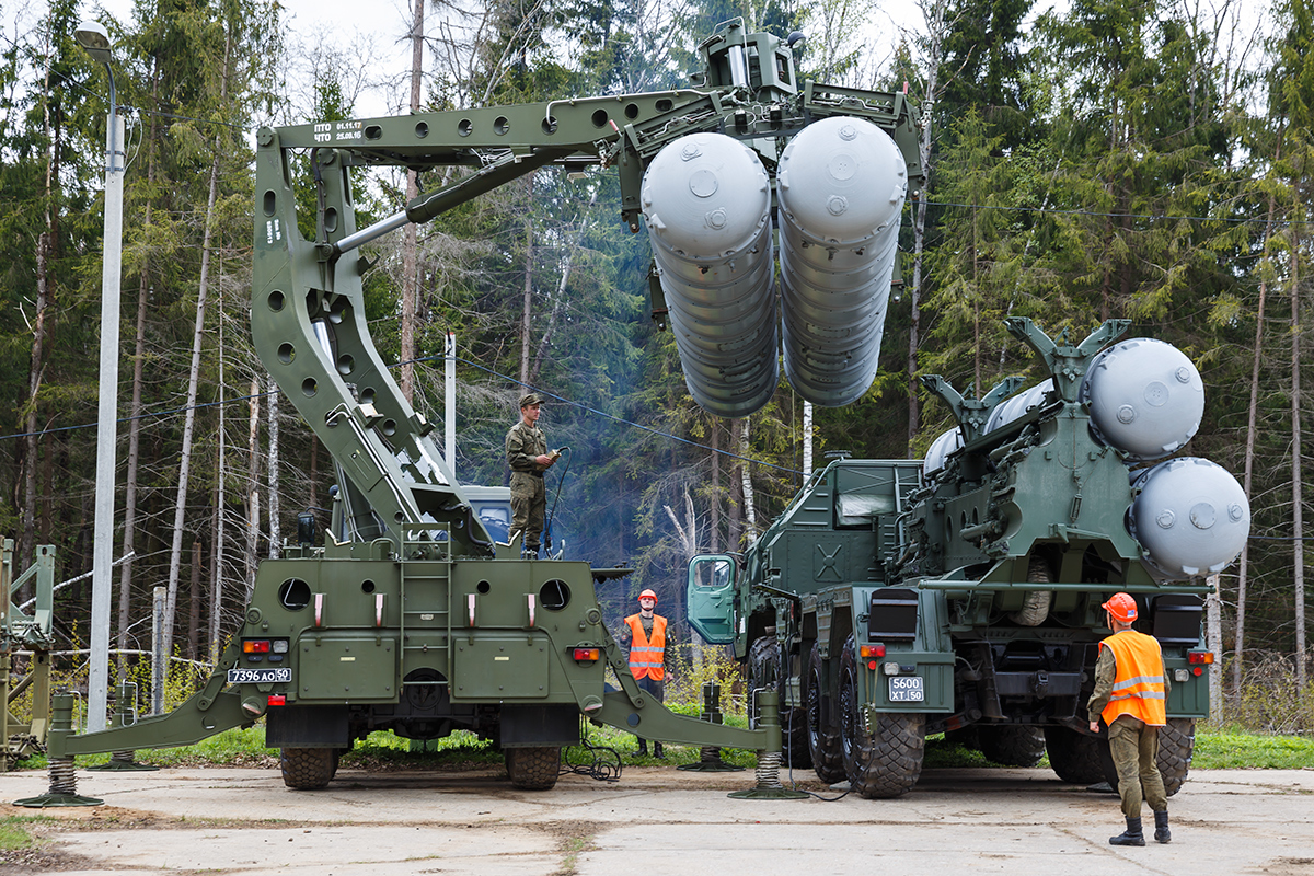 Учения 93-го гвардейского зенитного ракетного полка 4-й дивизии ПВО.